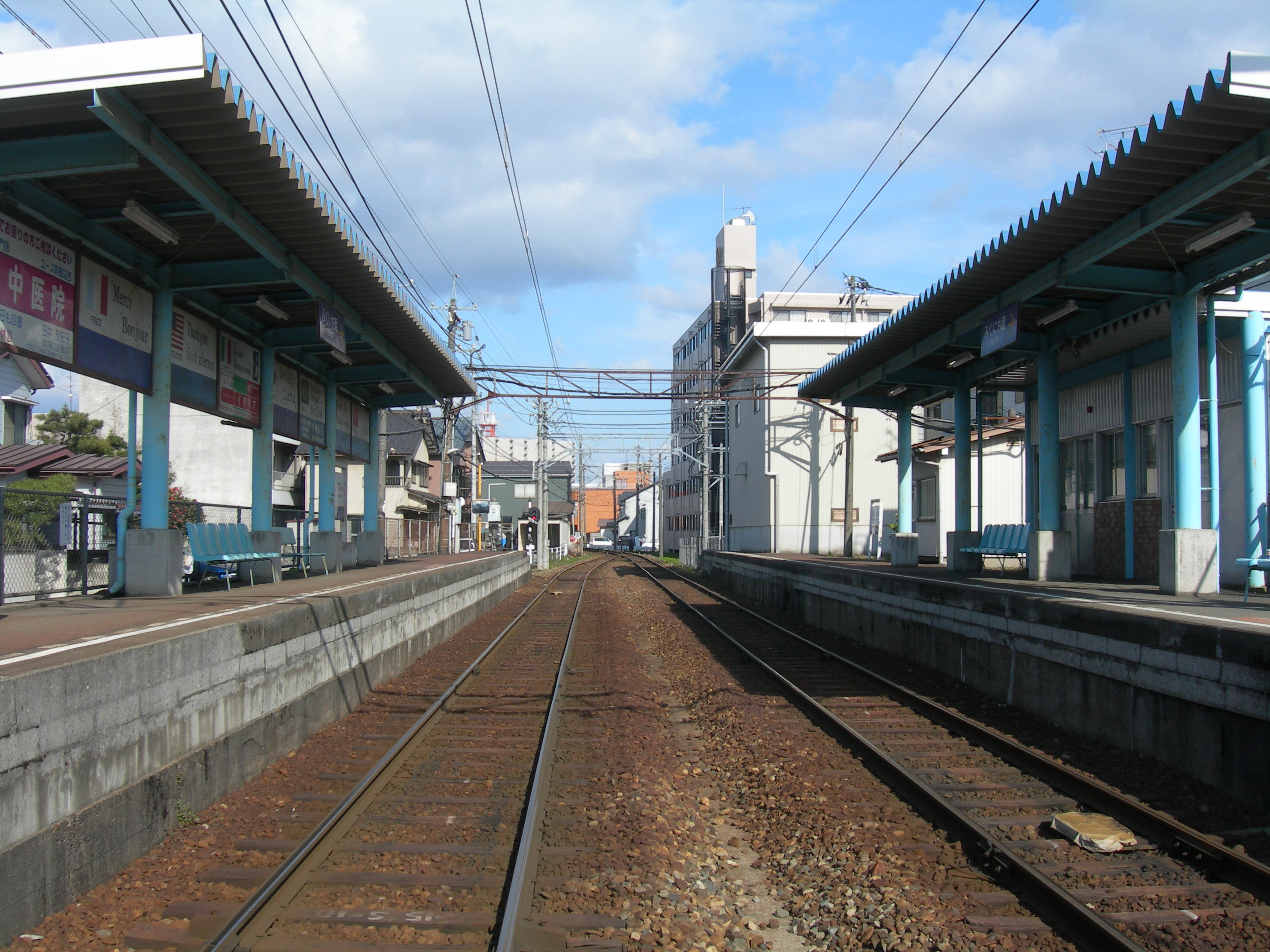 西別院駅ホーム